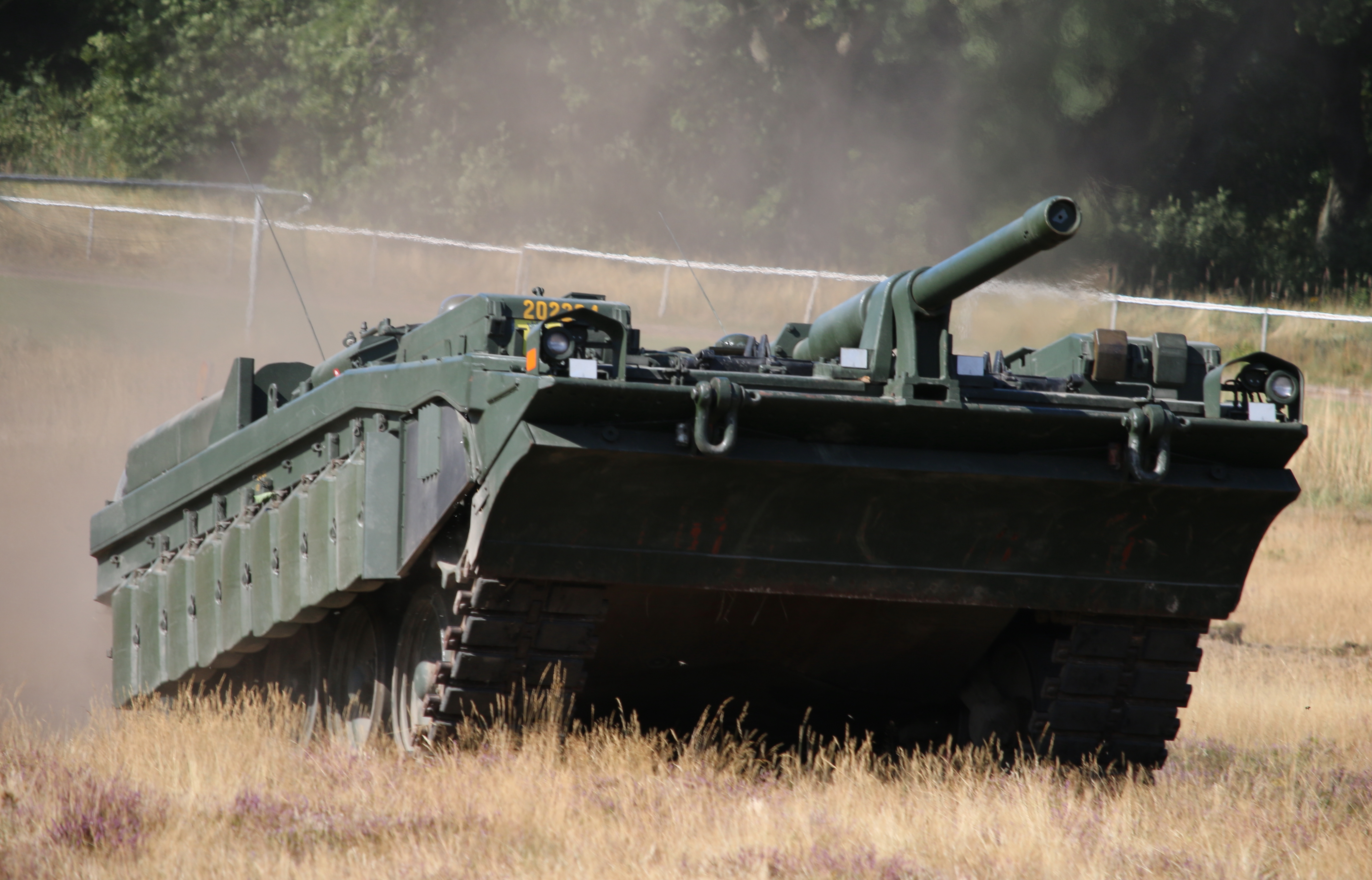 Stridsvagn 103 Revinge 2015